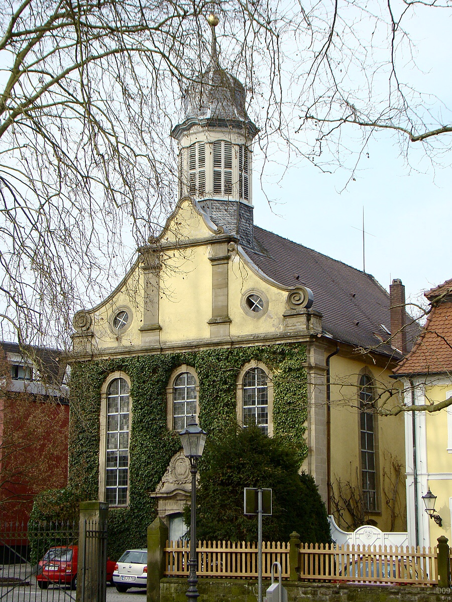 Alte Schlosskirche in Angelbachtal-Eichtersheim